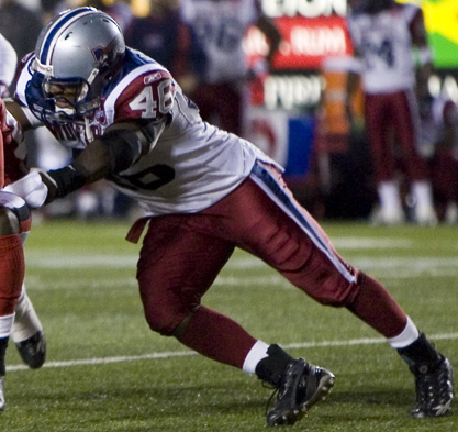 Kick Return Man